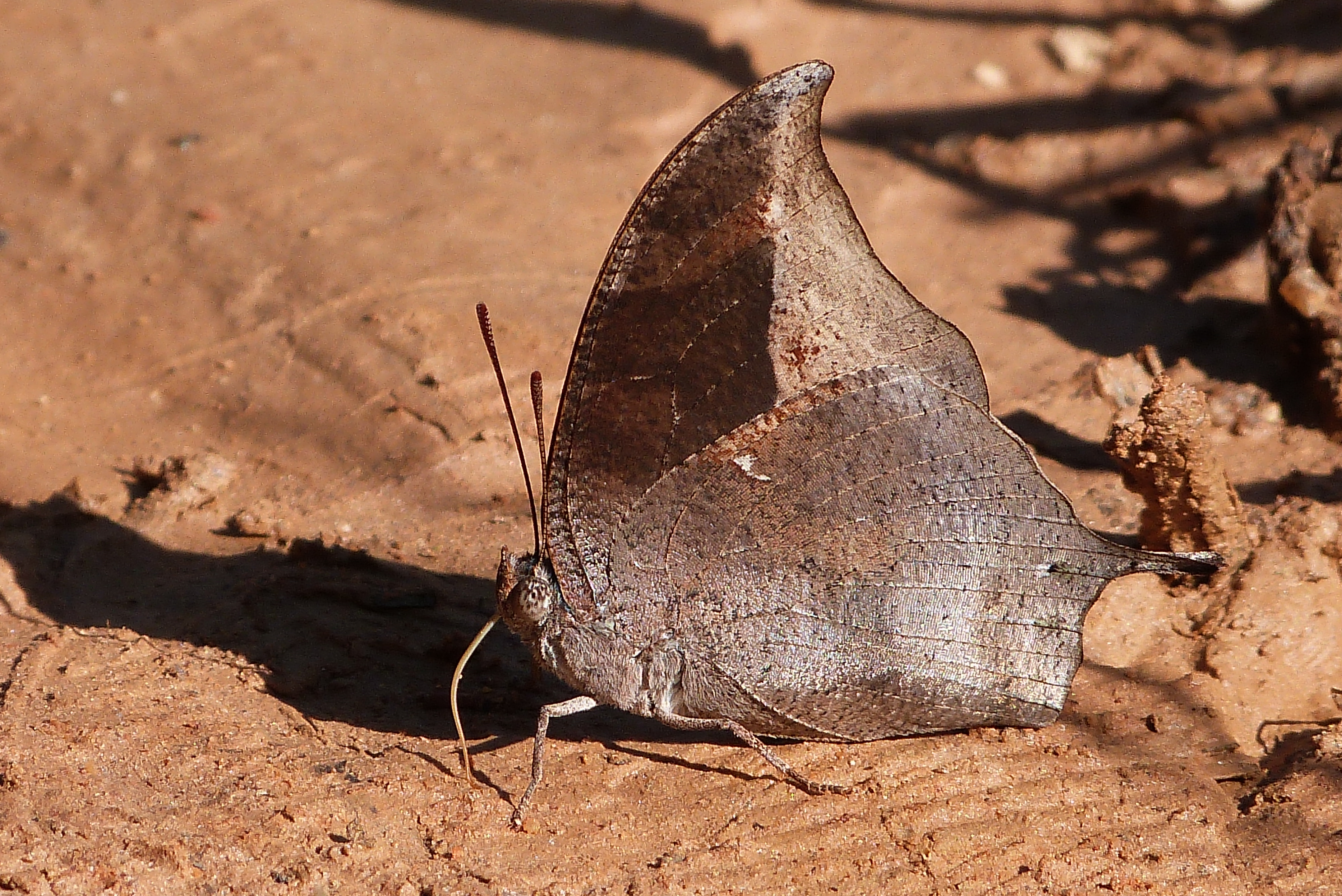 Foto tirada no Parque Estadual do Juqueri - Franco da Rocha - SP